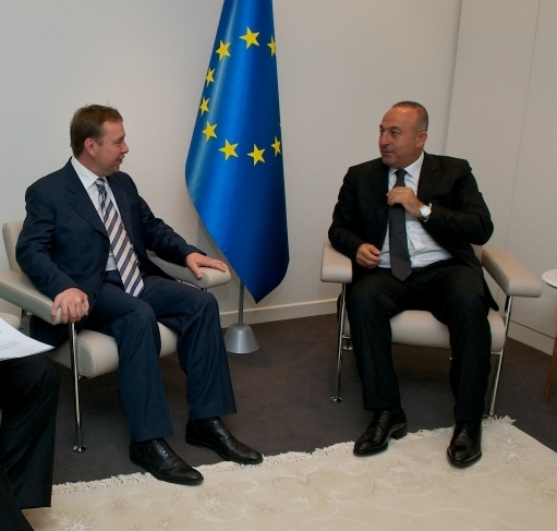 Владимир Костерин и Мевлют Чавушоглу